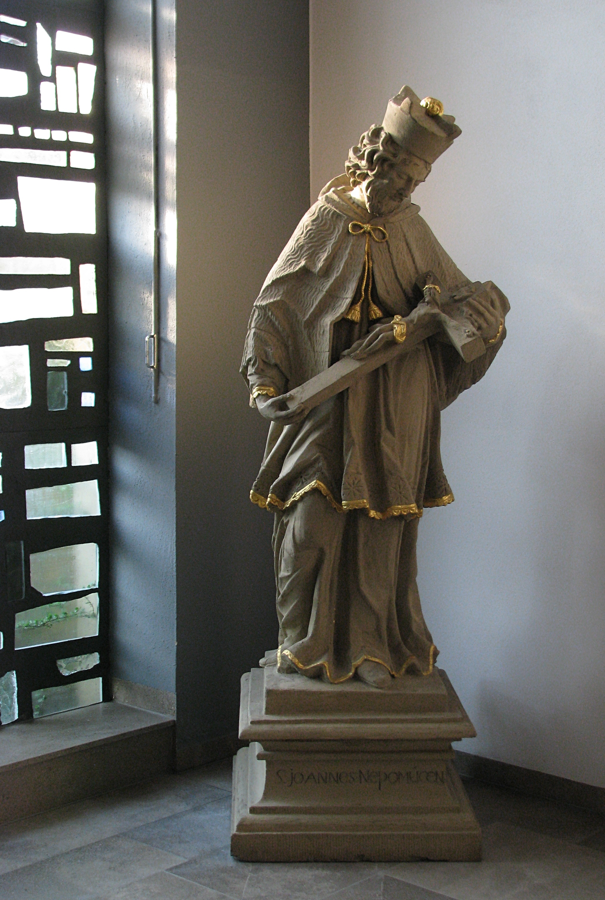 Brückenheiliger Sankt Nepomuk, jetzt in der Pfarrkirche Sankt Vitus, Wülfershausen an der Saale